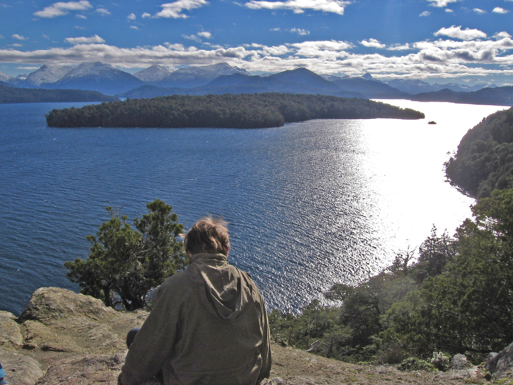 View from the Mirador in Villa La Angostura (Argentina!) Blick auf den See vom Aussichtspunkt in La Angostura (Argentinien)